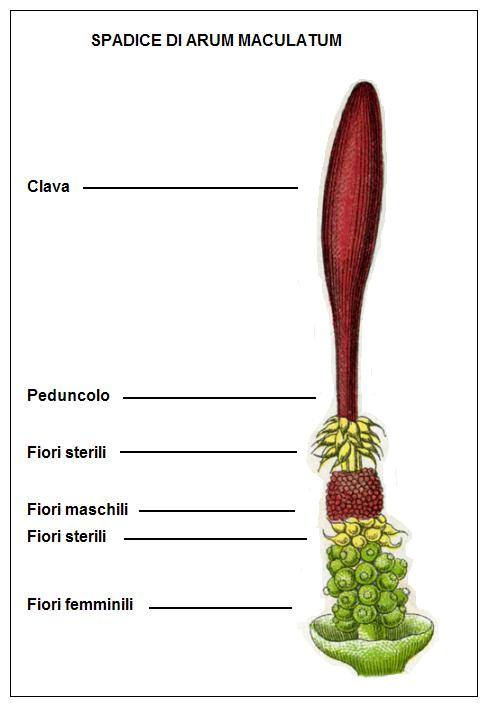 Arum maculatum Sturm DESC02.JPG